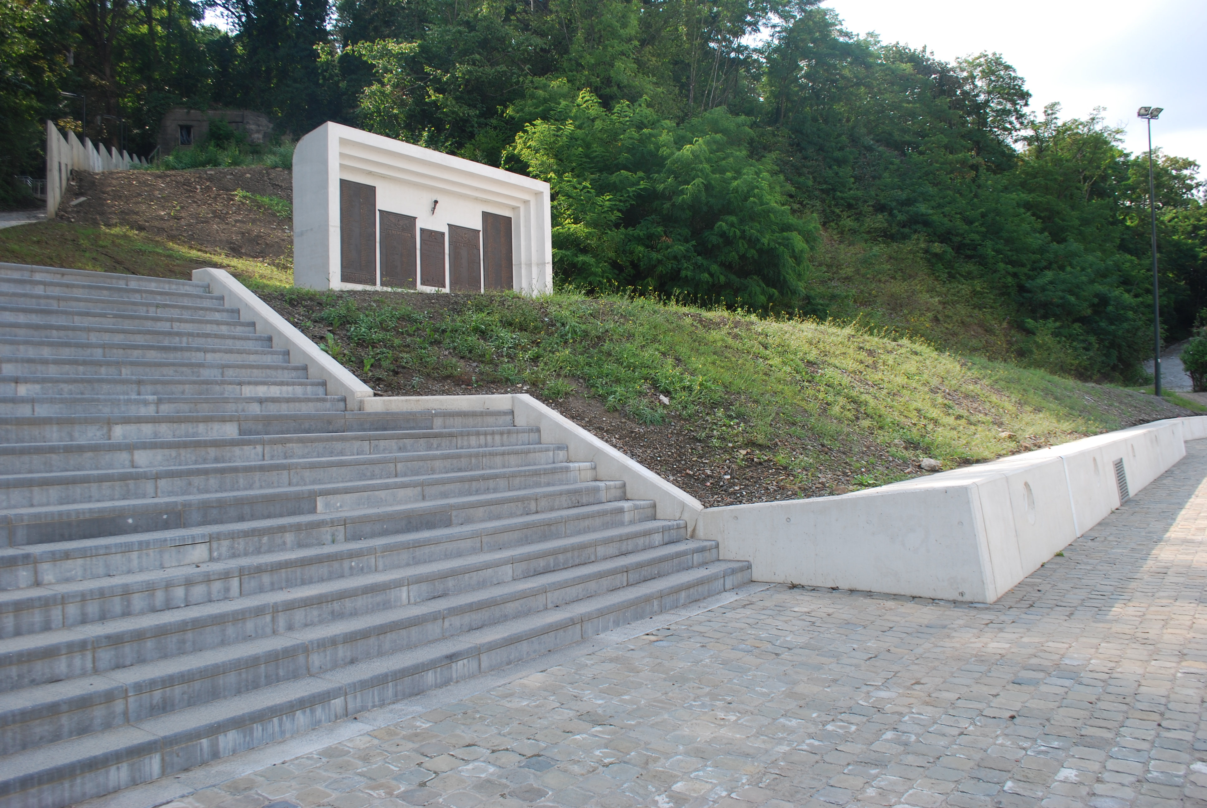 Vue du quartier de Fragnée-Guillemins à Liège.